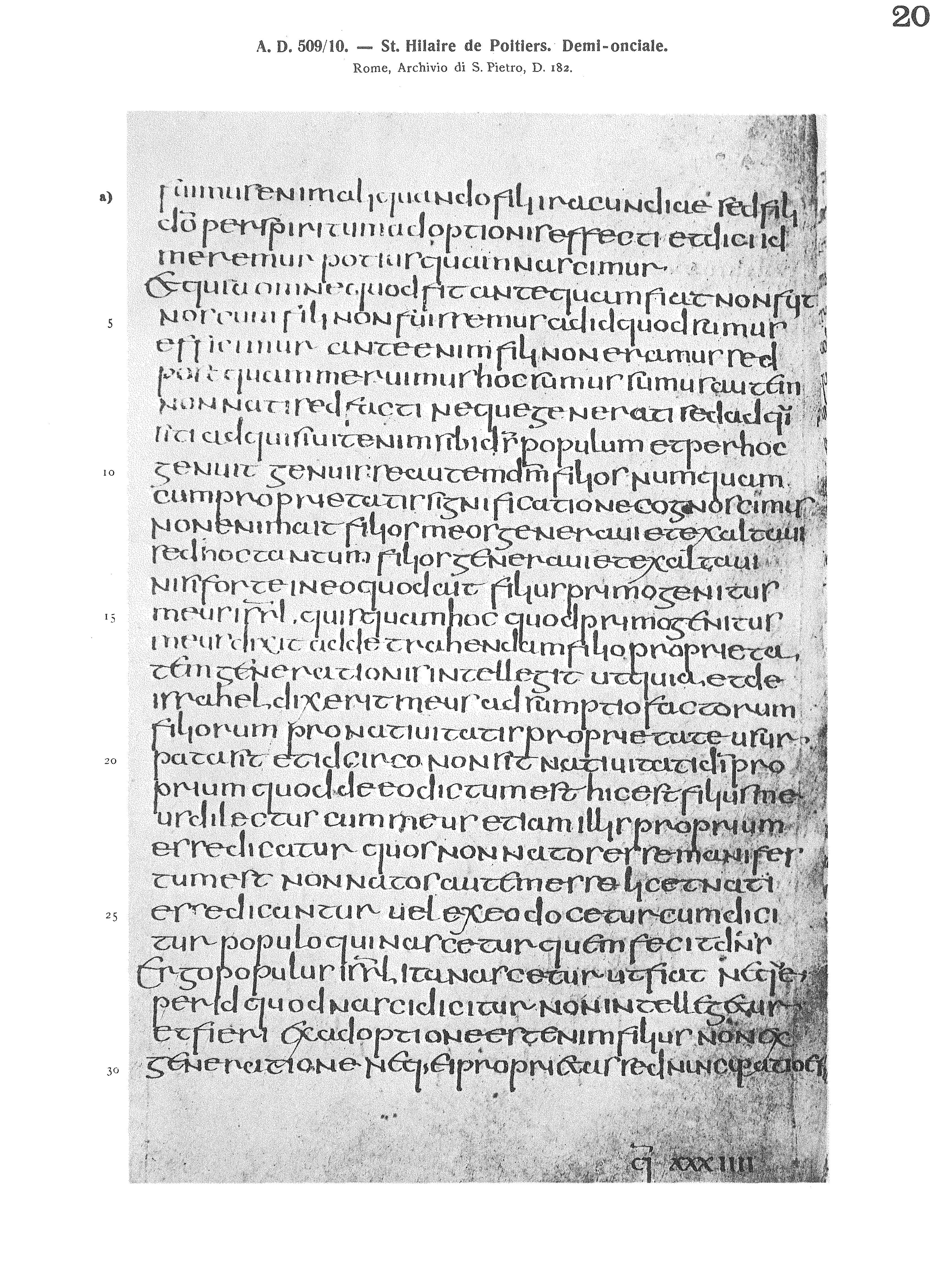 Half-uncial o semi-uncial; Steffens Franz; Paléographie latine; Trèves, Paris 1910